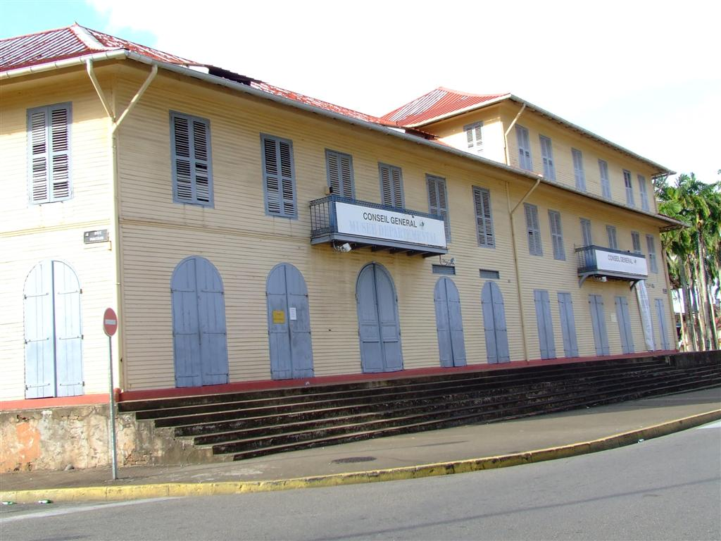 Auteur: Didwin Description: Musée Départementale